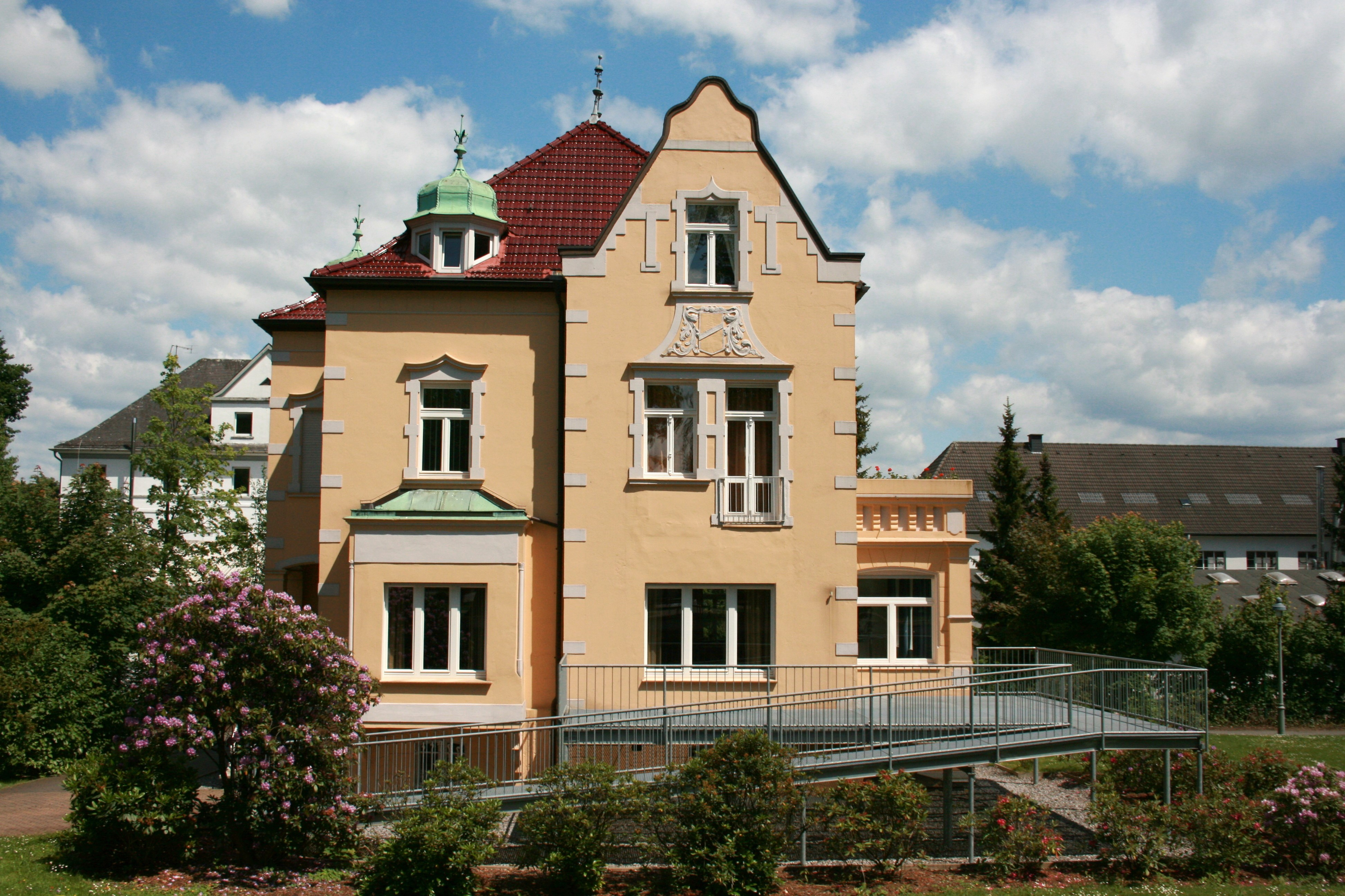 Villa am Wall in Neuenrade